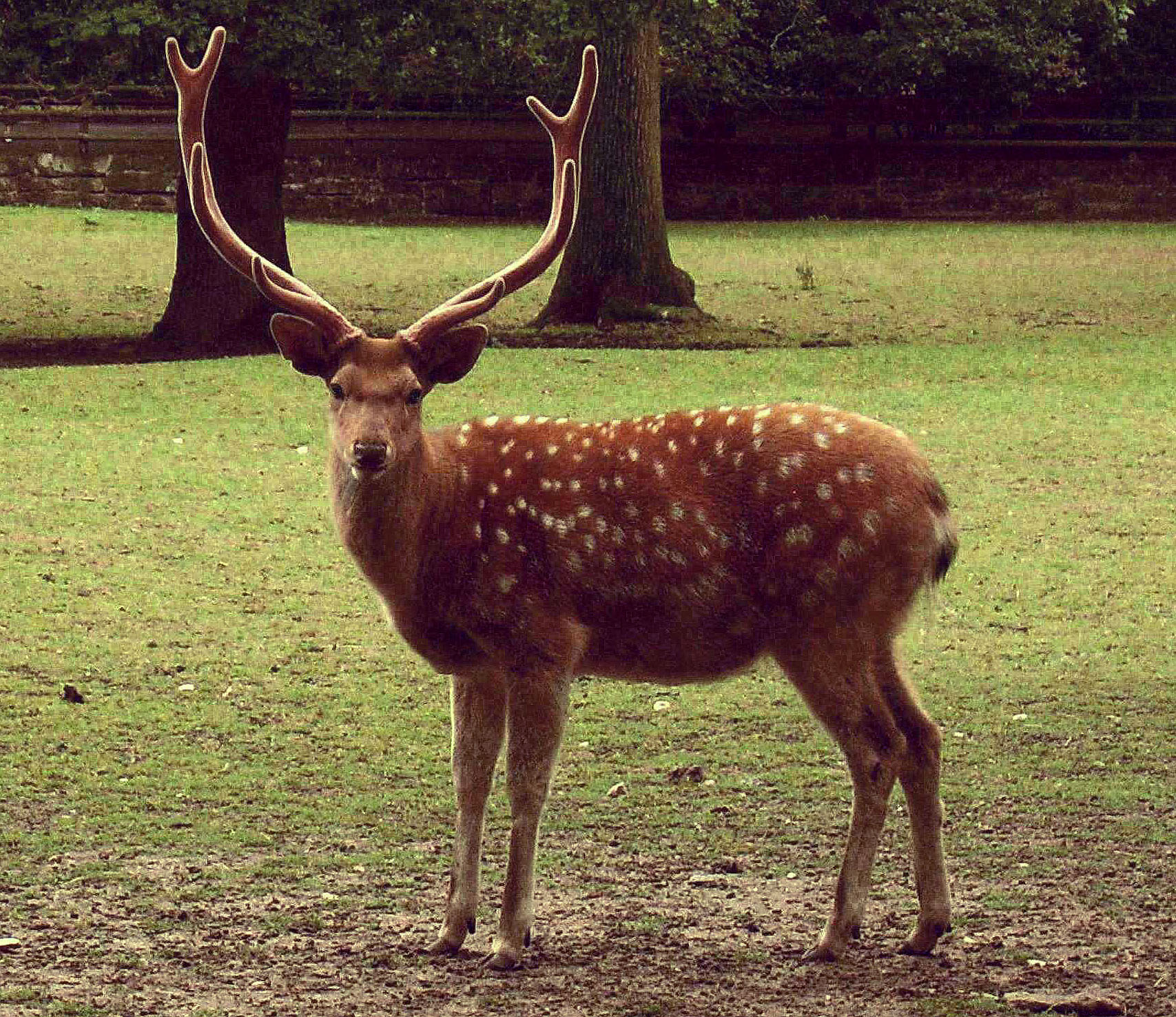 Dybowskihirsch Cervus nippon hortulorum Tiergarten Nürnberg.